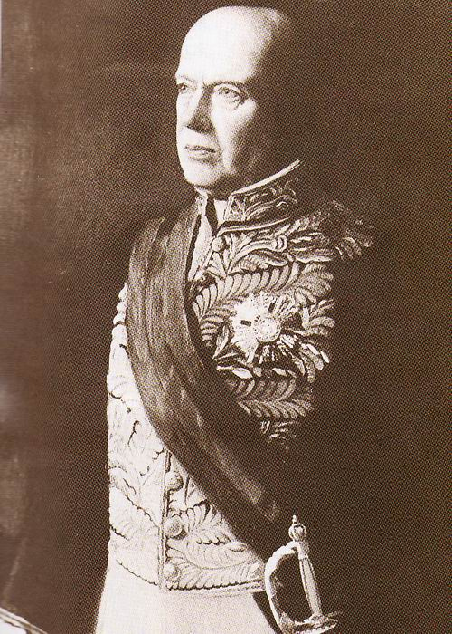 中文（香港）: 第5任香港總督羅士敏勳爵（1824 - 1897）督憲閣下，任期為1859.5 - 1863.3。